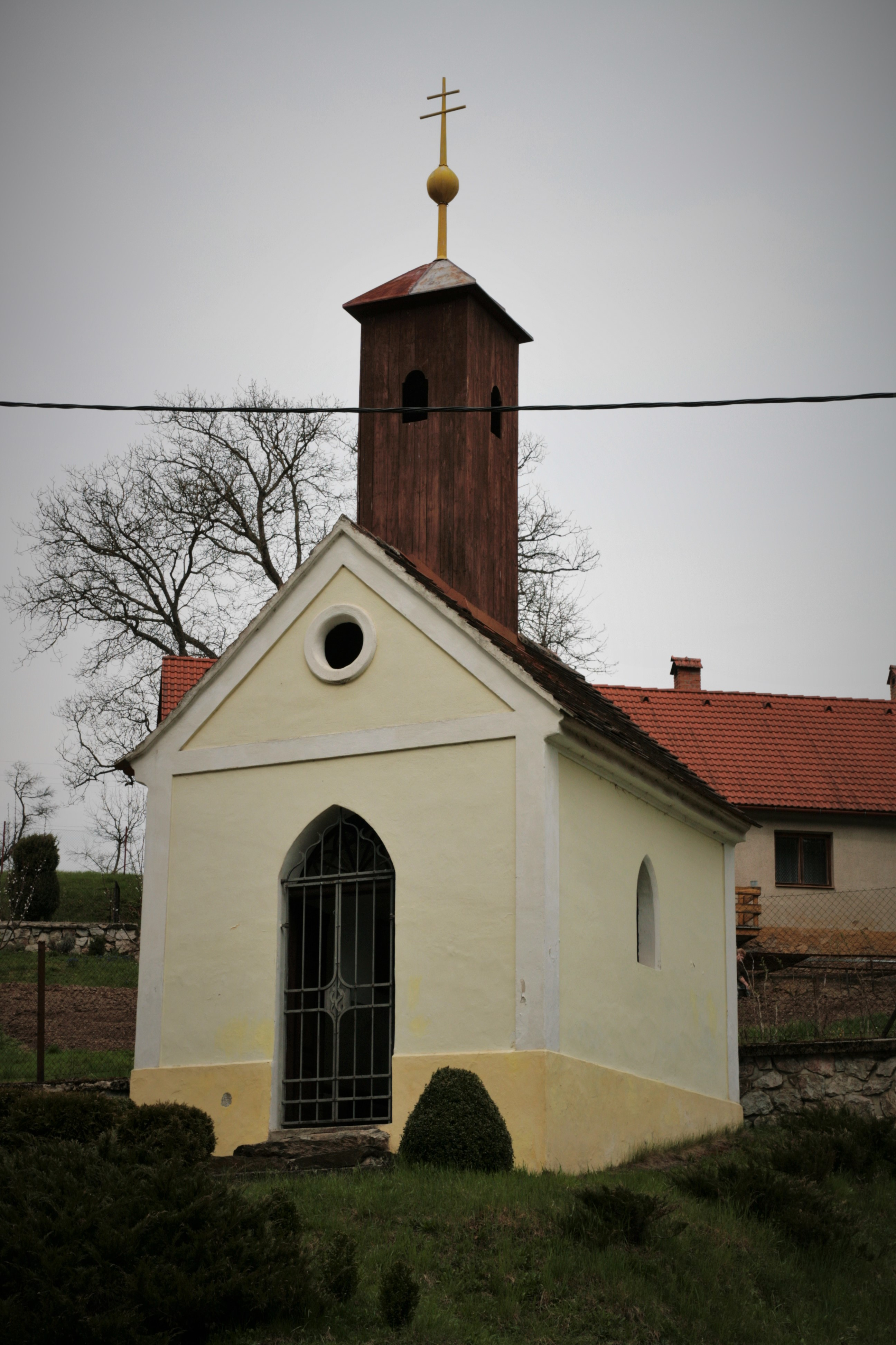 Vesnice Rakové, část obce Olší v okrese Brno-venkov. Kaple sv. Anny.